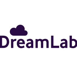 логотип проекту DreamLab